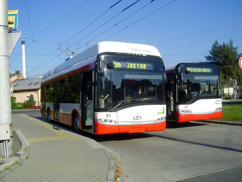 Solaris Trollino 12 AC III. generace (ev. č. 91) a Solaris Trollino 12 AC I. generace (ev. č. 85) na konečné "Bílovecká".